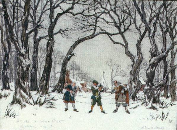 Бенуа Александр Николаевич "Эскиз декорации к комедии Мольера Лекарь поневоле"